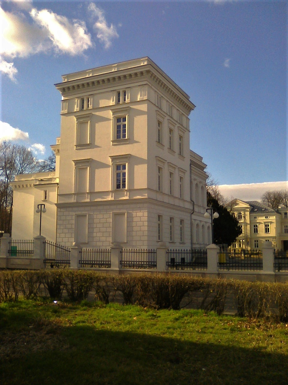 Dzierżoniów, ul. Świdnicka